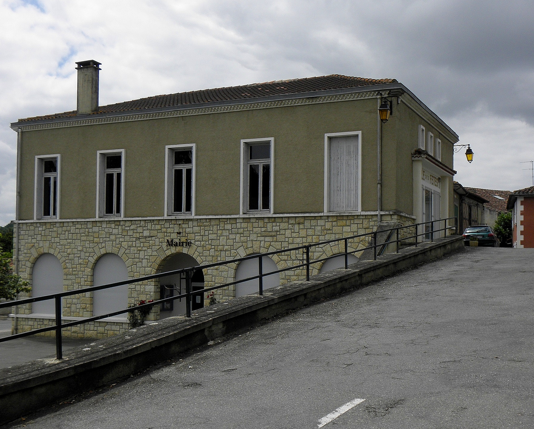 Mairie de Pessan (32).